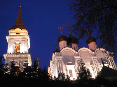 Церковь Владимира равноапостольного, что в Старых Садех (Москва)